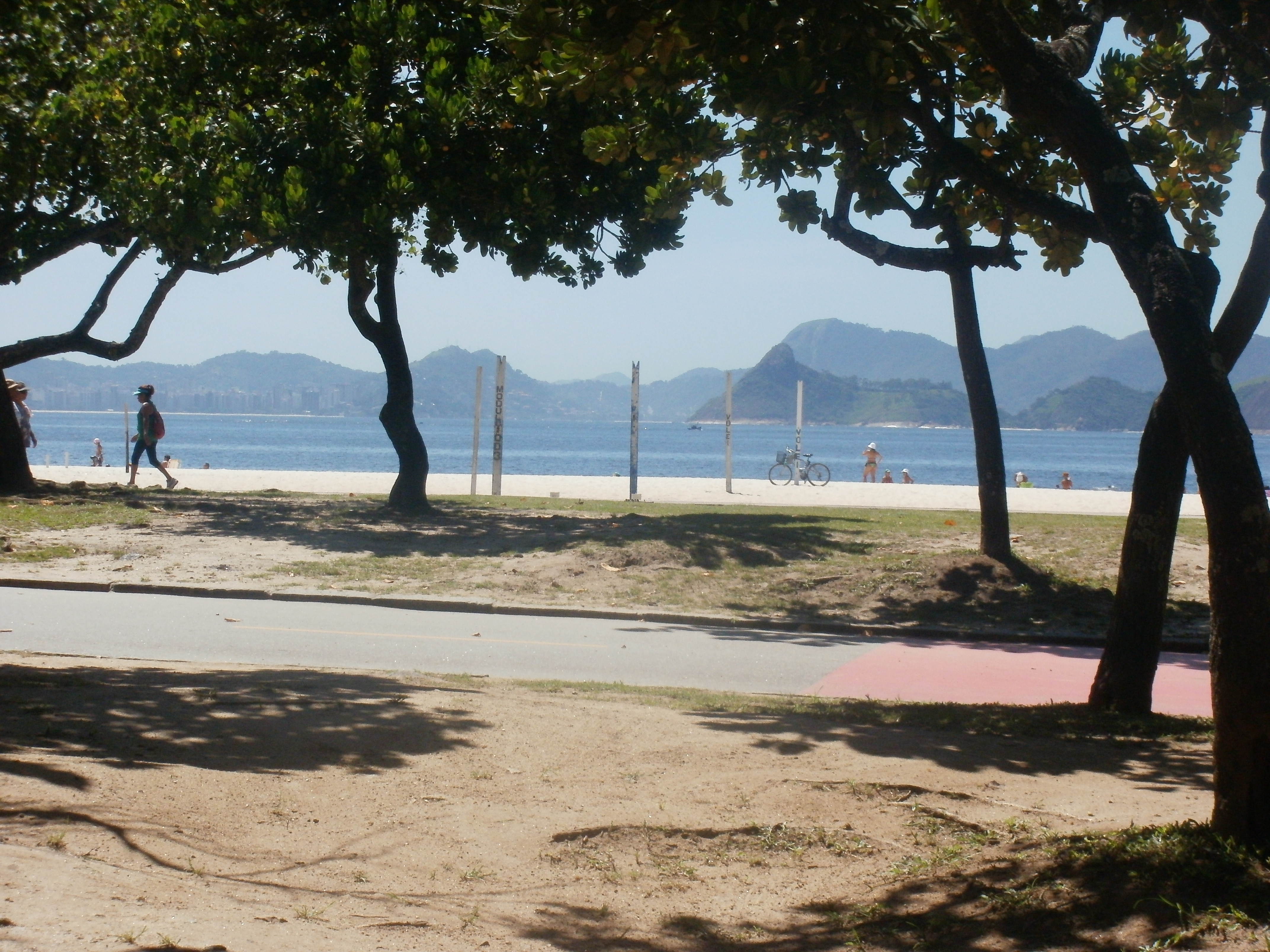 Parque do Flamengo, na cidade do Rio de Janeiro, Brasil.